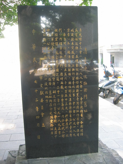 清臺灣巡撫衙門舊址碑背面，1983年4月臺北市文獻委員會立，2006年7月20日mingwangx攝。 Back of Taiwan Xun-fu Ya-men Jiu-zhi, taken by mingwangx at July 20th, 2006.